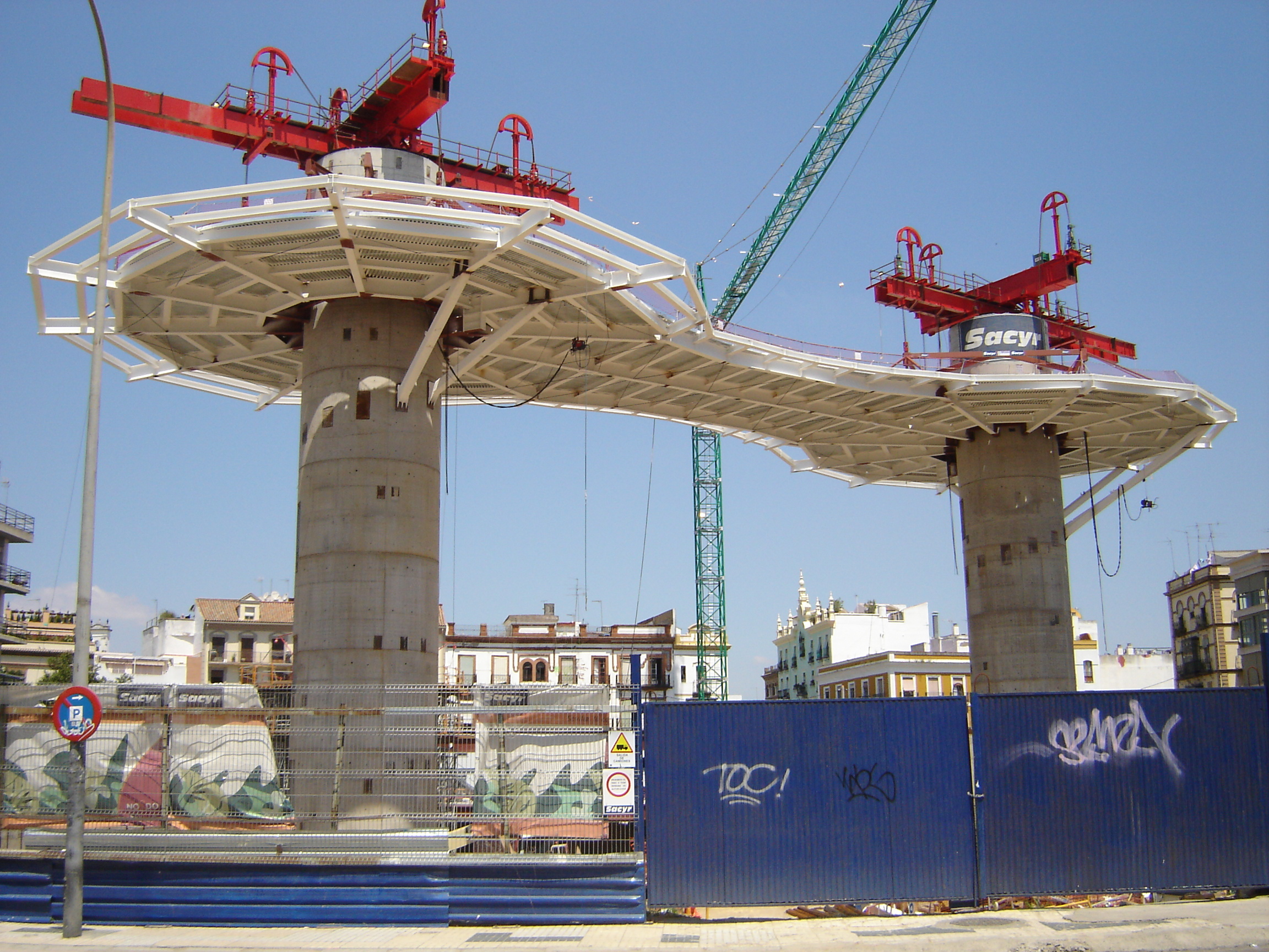 Edificio ocio y comercio "Metrosol Parasol de la Encarnación" (Sevilla). Proceso de construcción.